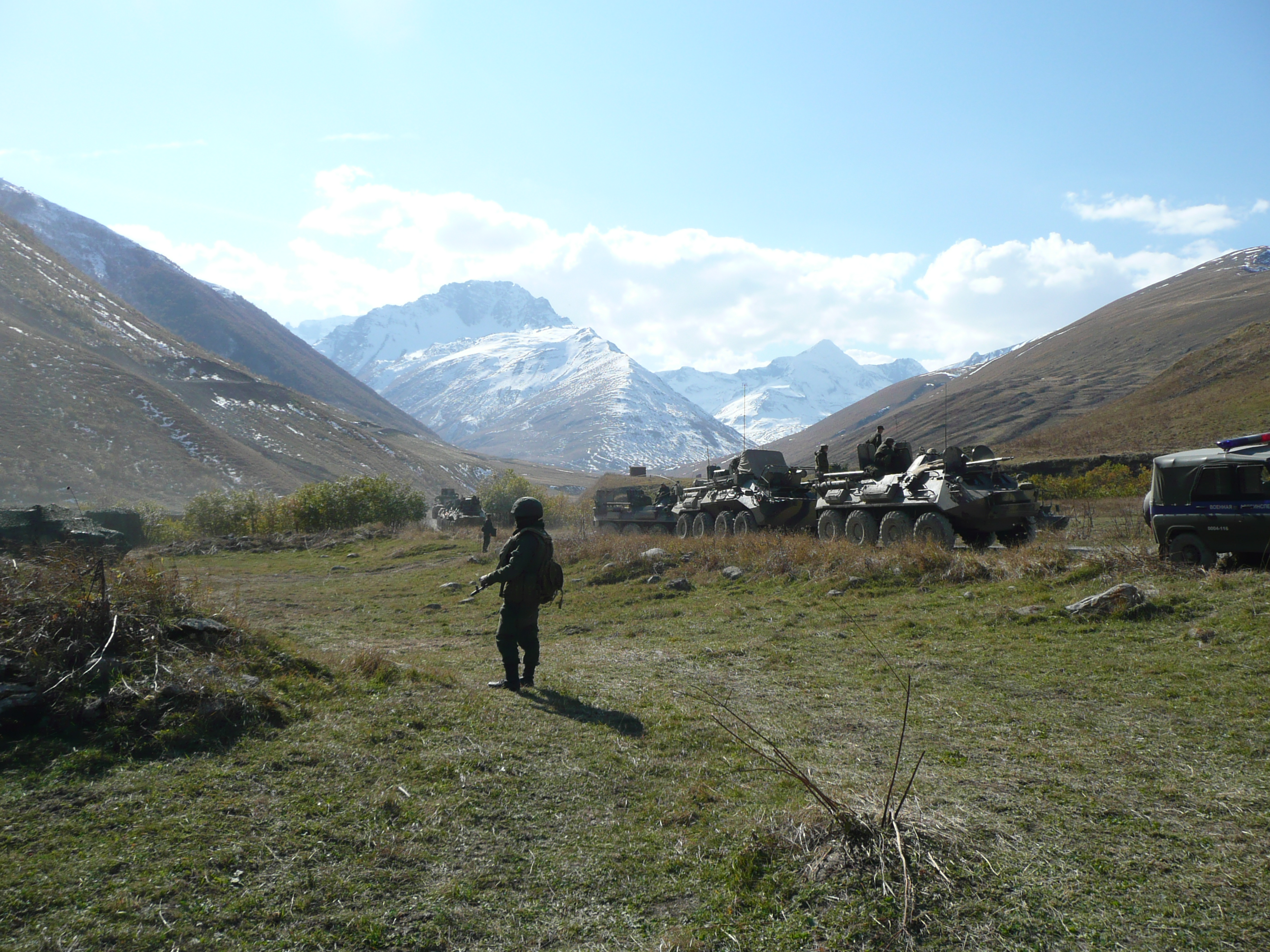 Колонна штабных машин на Транскаме.